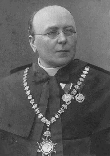 Jan Alois Kubíček (1857 - 1929), Český kněz a církevní historik.